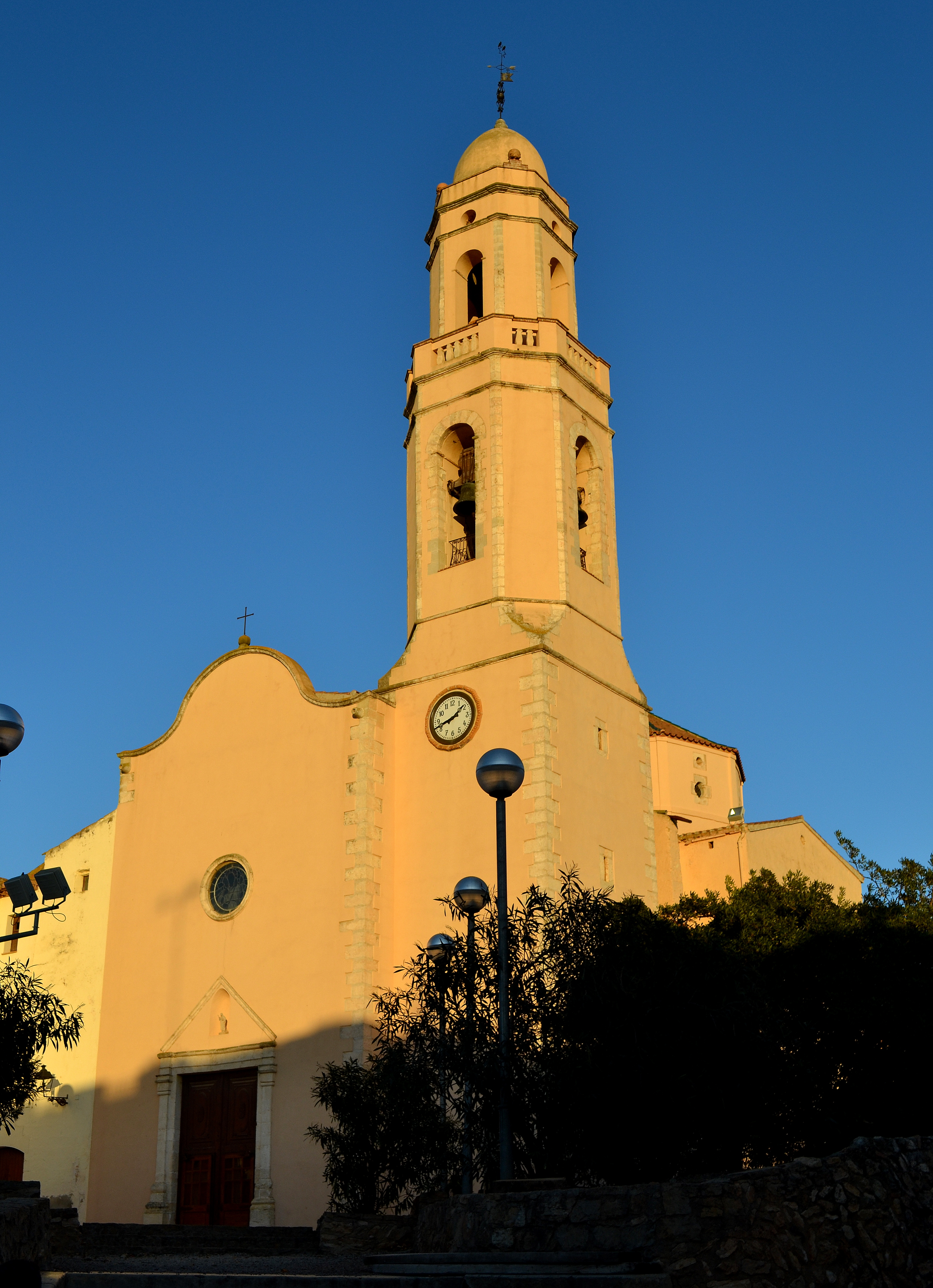 Església de Santa Magdalena (Bonastre)